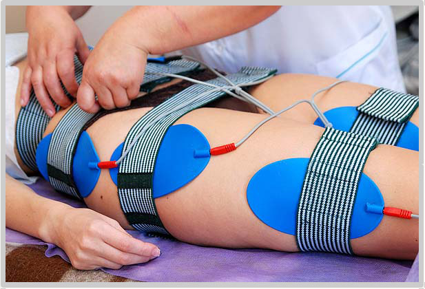 Електростимуляция